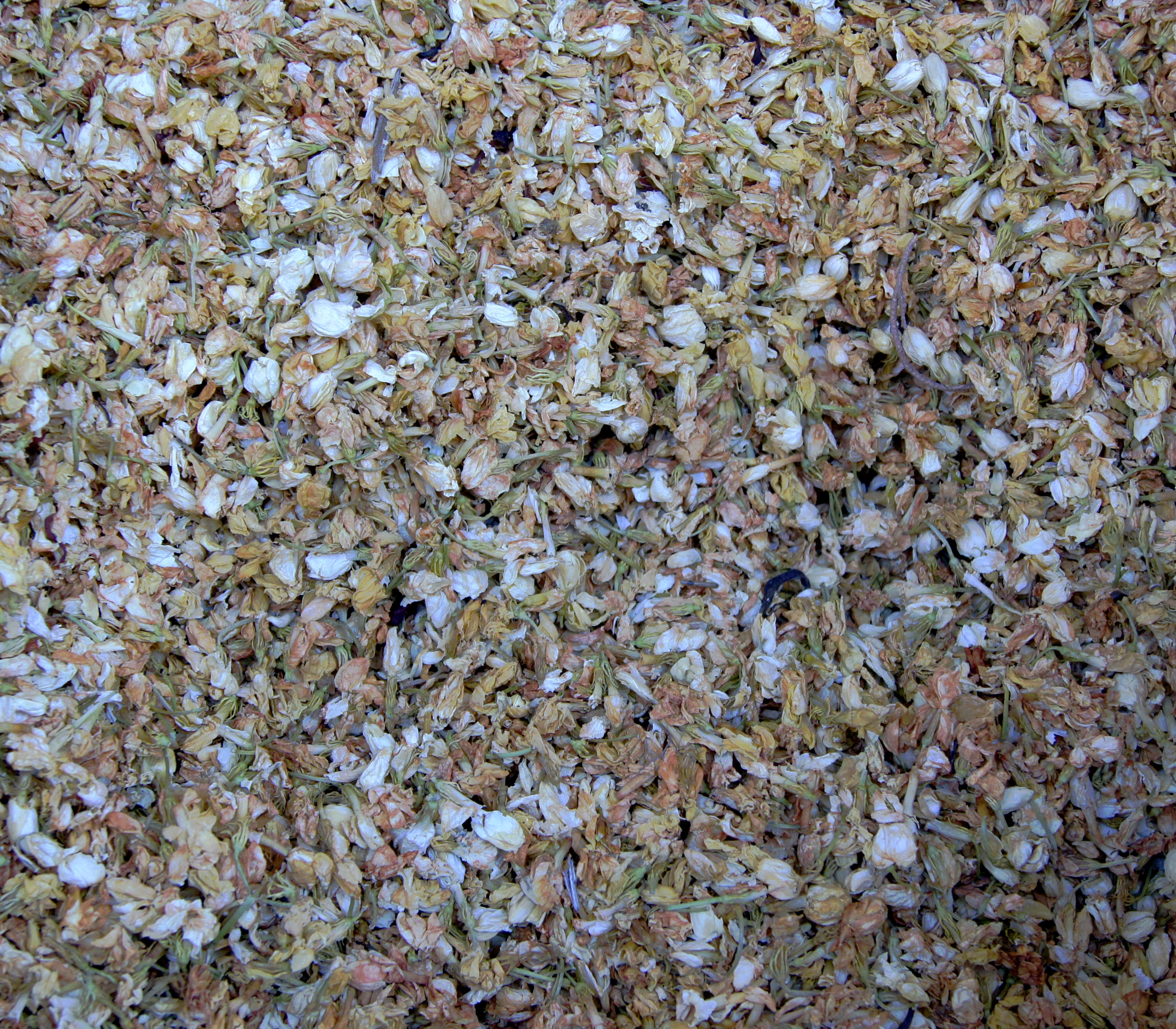 dried jasmine flowers